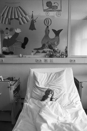 Krankenbett in der Kinderklinik an der Lachnerstraße, München am 27.02.1995